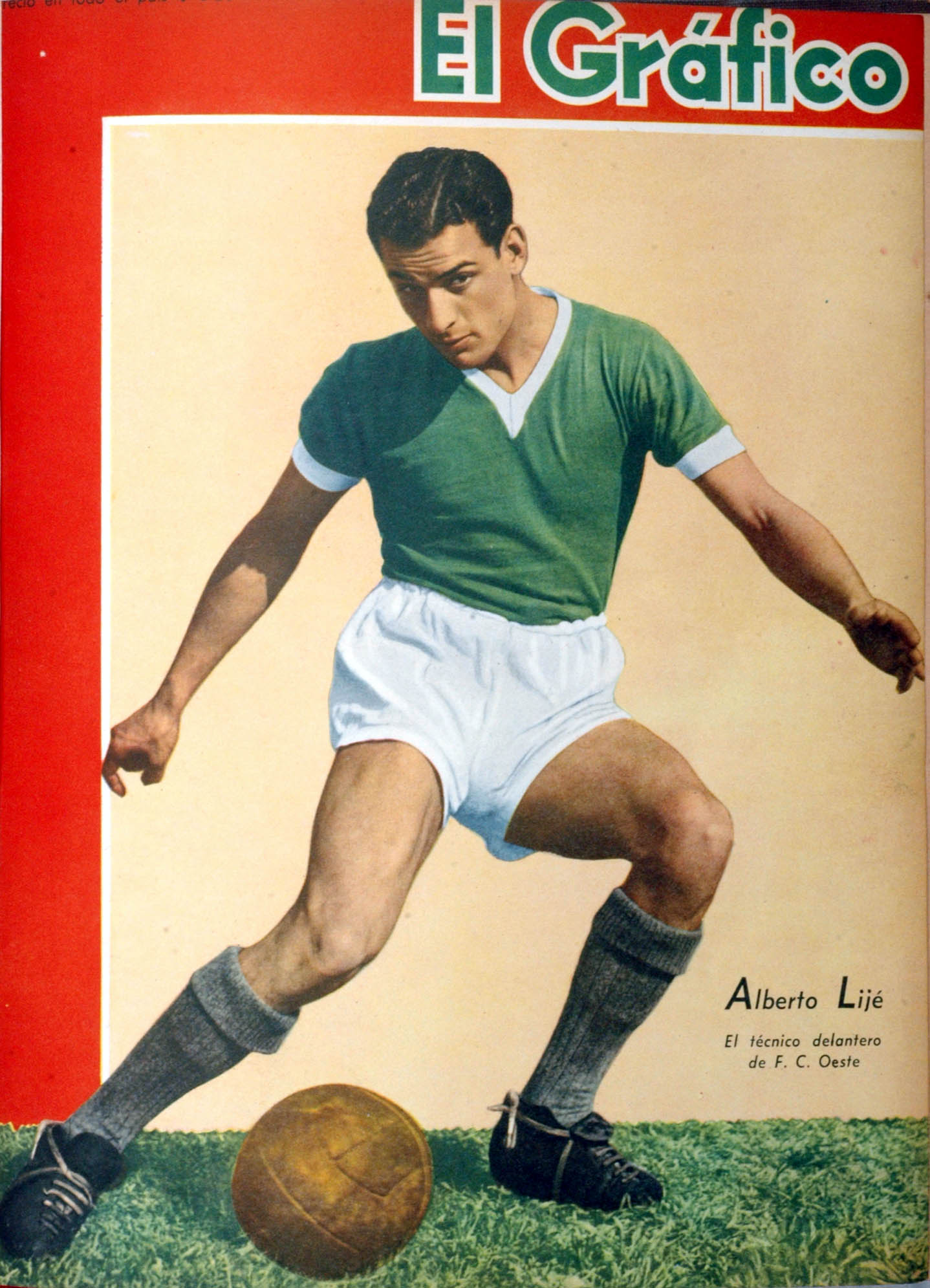 El Grafico del 20 de Agosto de 1943. Edicion 1258